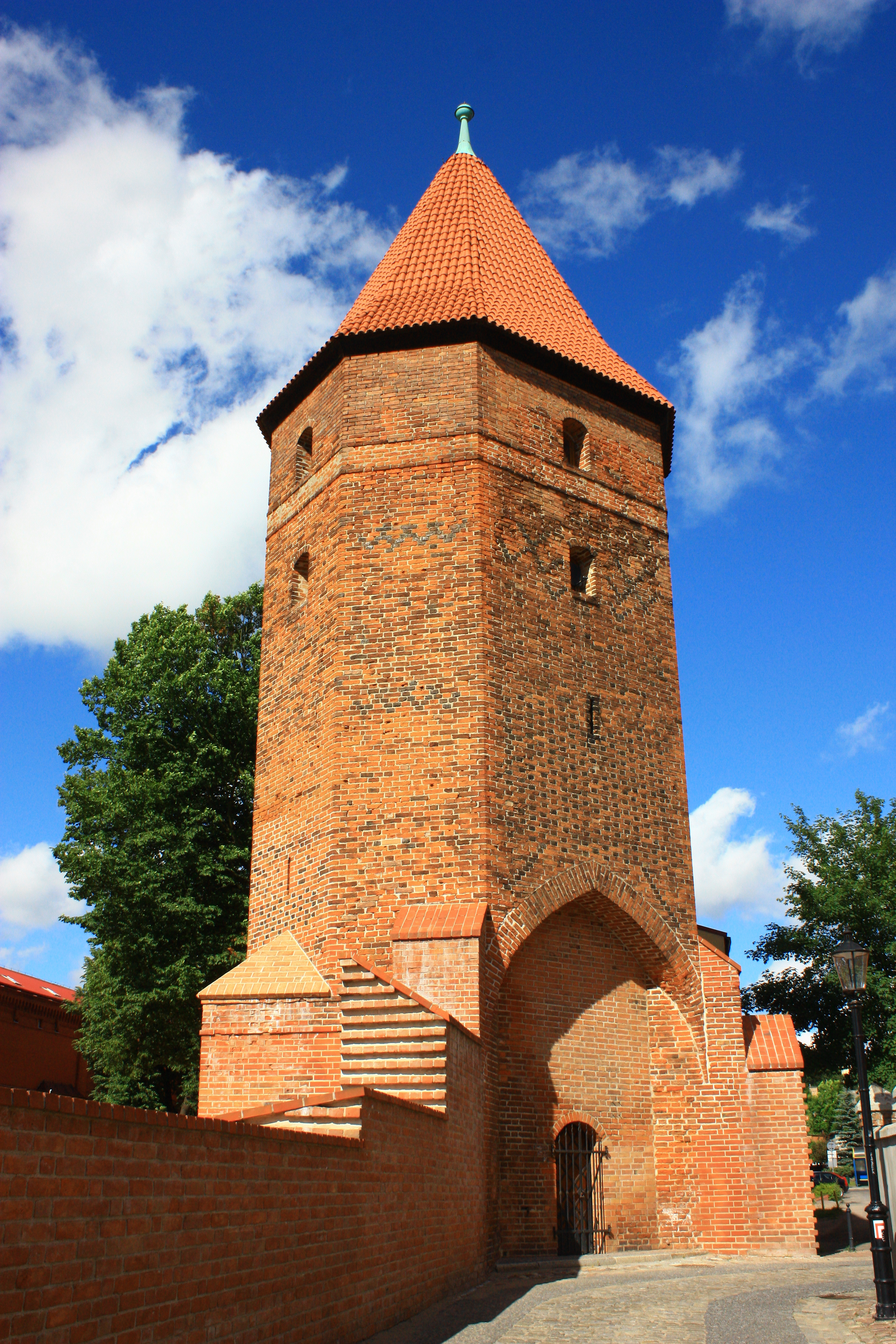 Lębork, obszar Starego Miasta, XIII